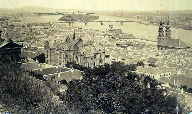 Kilátás a Halászbástyáról 1876 körül. Előtérben a Budai Főreáltanoda (ma Toldy Ferenc Gimnázium) és a Szent Anna-templom, háttérben a Margit híd